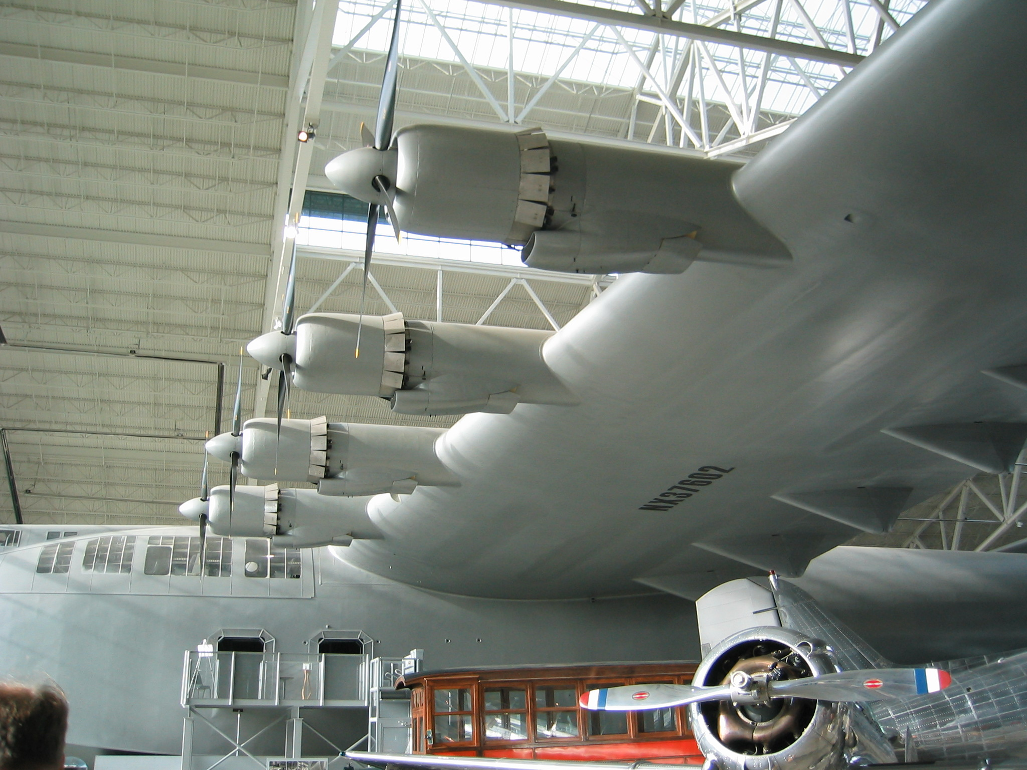 Die linkervlerk met vier van die agt motore van die HK-1.